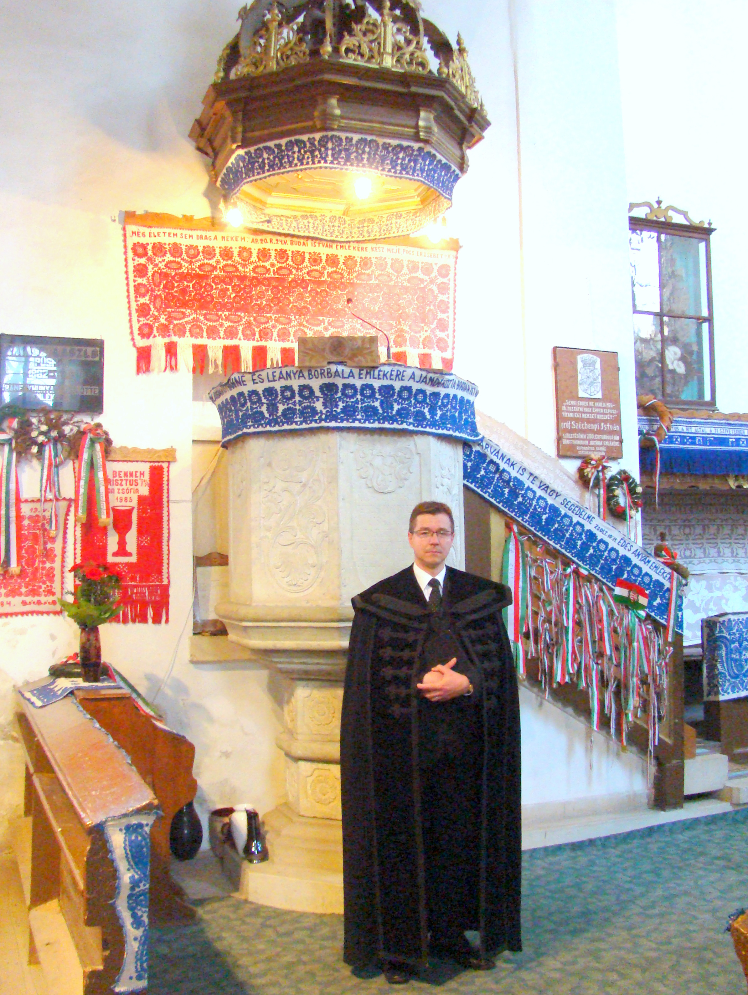 Biserica reformată din Huedin